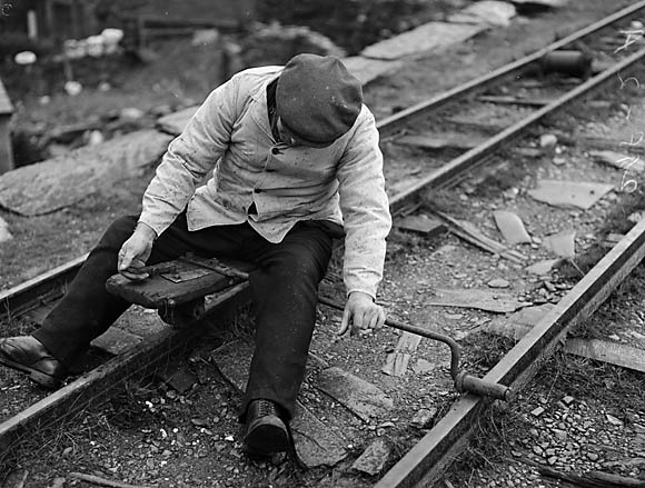 Teitl Cymraeg/Welsh title: Reidio'r car gwyllt yn chwarel y Graig-ddu Cyfrwng/Medium: Negydd ffilm / Film negative Cyfeiriad/Reference: (gch14423) Rhif cofnod / Record no.: 3470209 Rhagor o wybodaeth am gasgliad Geoff Charles yn Llyfrgell Genedlaethol Cymru More information about the Geoff Charles Collection at the National Library of Wales Mae ffotograffau Geoff Charles hefyd yn rhan o Broject Europeana Libraries Geoff Charles' photographs also form part of the Europeana Libraries Project